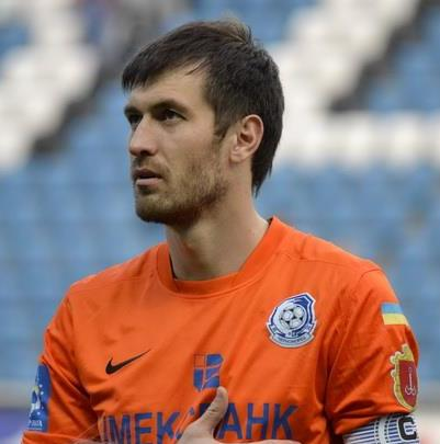 Дмитро Безотосний - український футболіст, воротар за часів виступів за Чорноморець